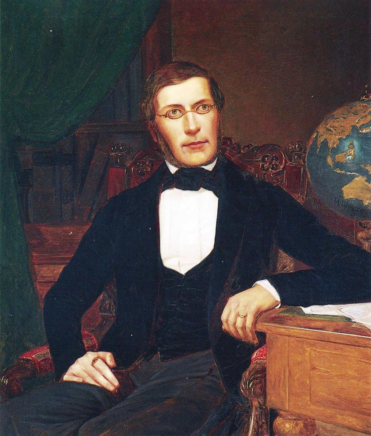 Helsingin yliopiston suomen kielen professori Matthias Alexander Castrén (1813–1852) postuumissa muotokuvassa, jonka malleina käytettiin valokuvaa ja aiempia muotokuvamaalauksia. Muotokuva kuuluu Helsingin yliopiston kokoelmiin.